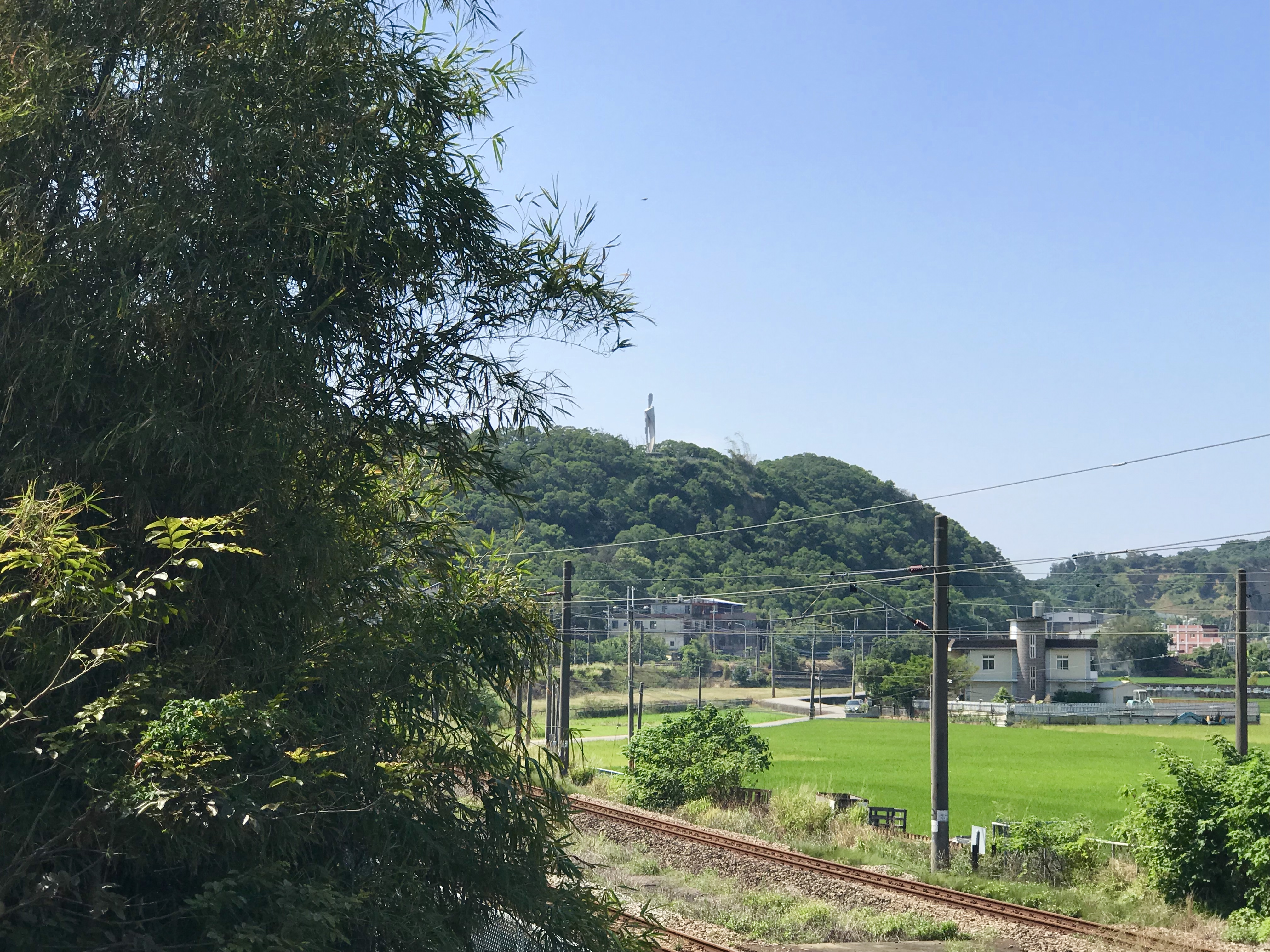 鄭漢紀念碑與談文車站海線鐵軌